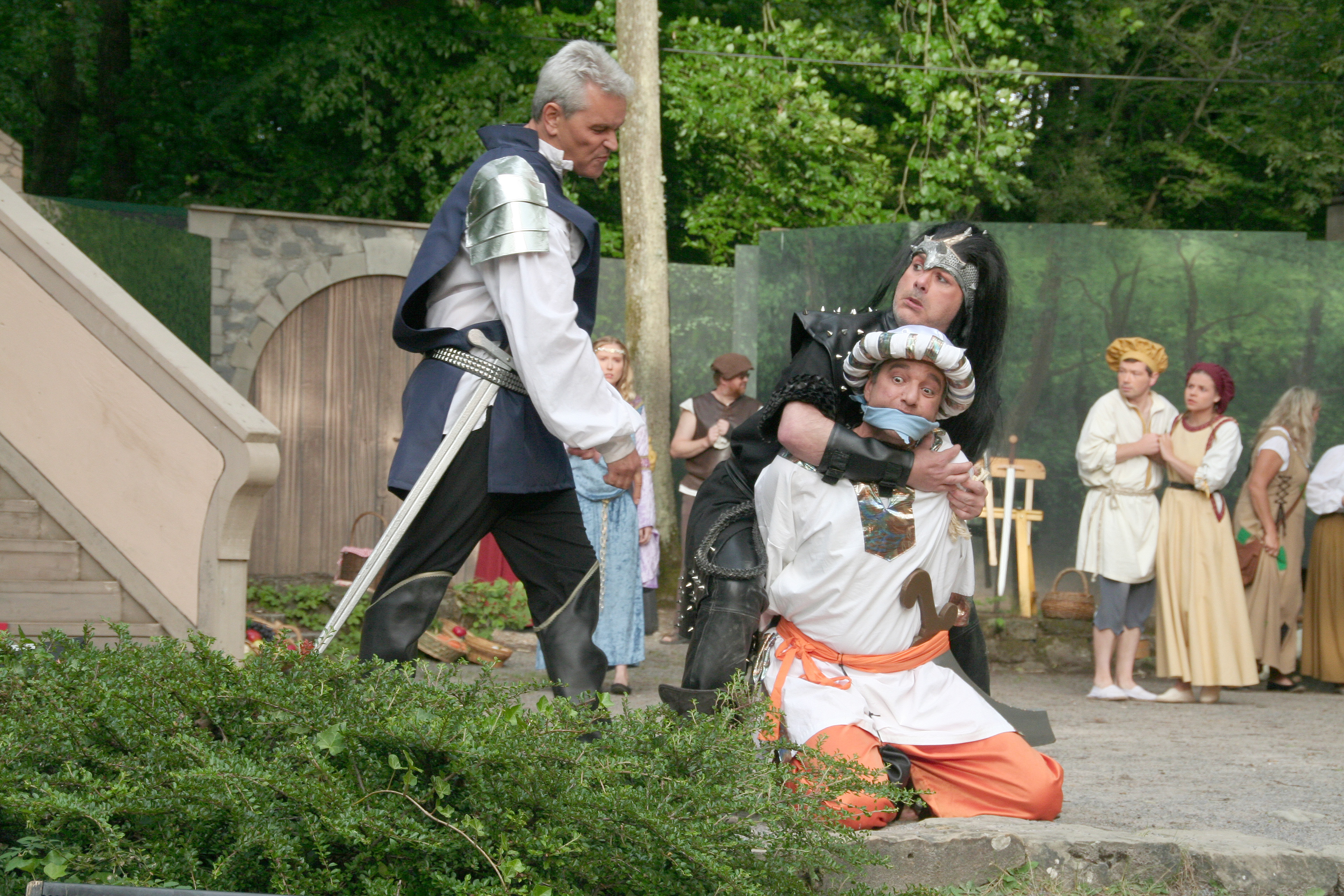 Spielzeit 2017: Der Sheriff von Nottingham lässt Ahmed Mustafa Hamsa Berber festnehmen.